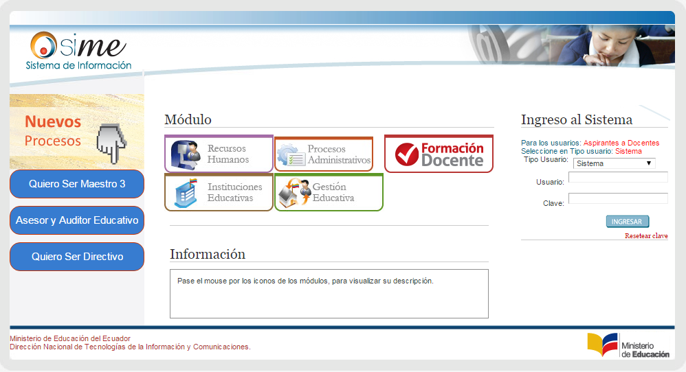 Captura de pantalla del Sistema de Información del Ministerio de Educación de Ecuador, mejor conocido como SIME